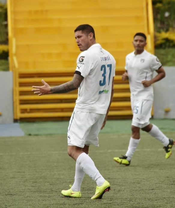 Paulo Centurión ordenando a su línea defensiva en un pasaje del partido